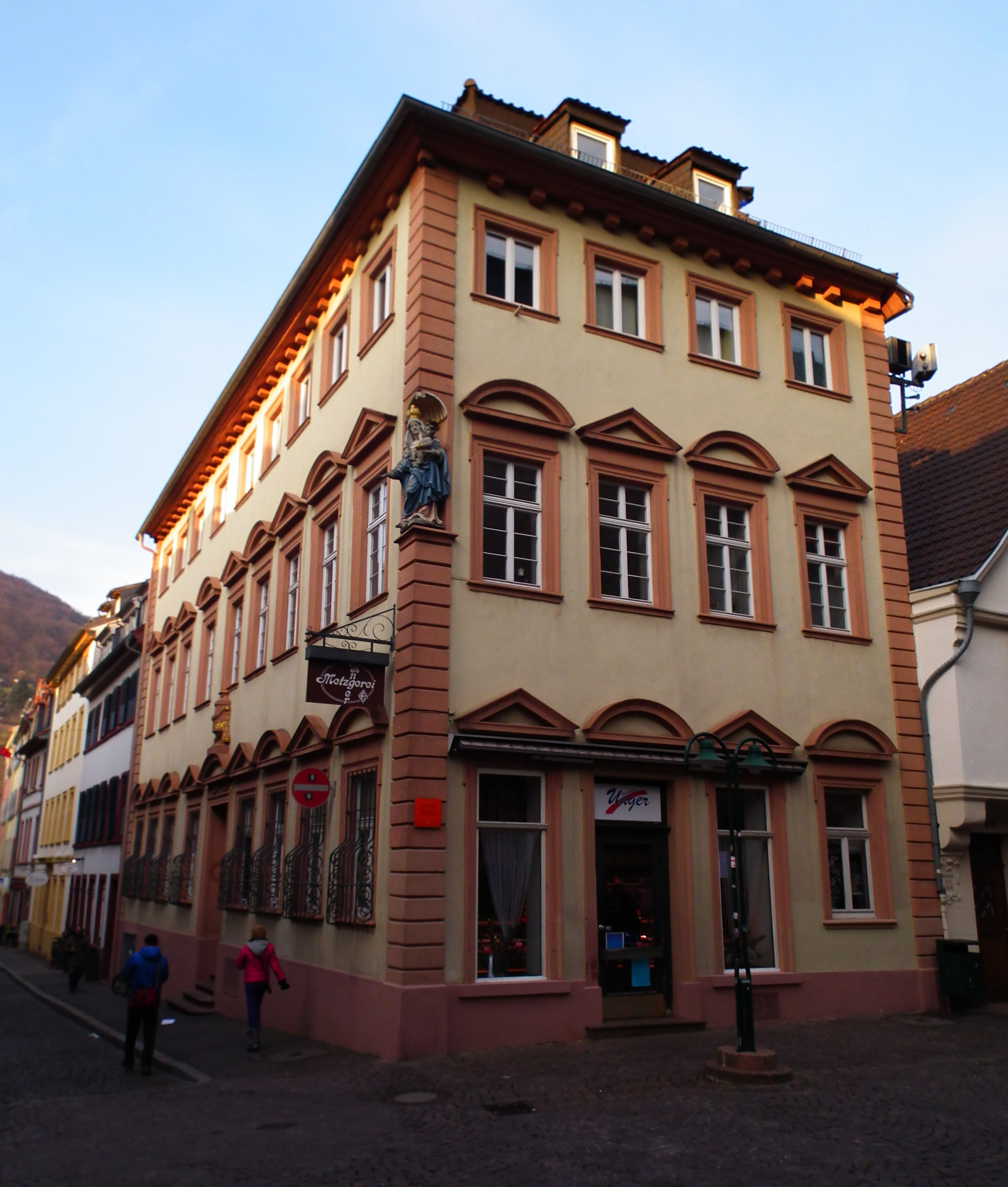 Haus Traitteur in der Heidelberger Altstadt (Baden-Württemberg, Deutschland)